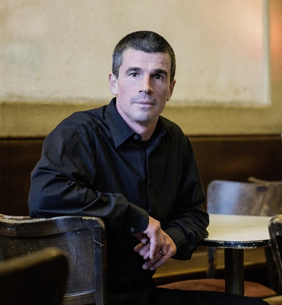 Portrait von Boris Previsic